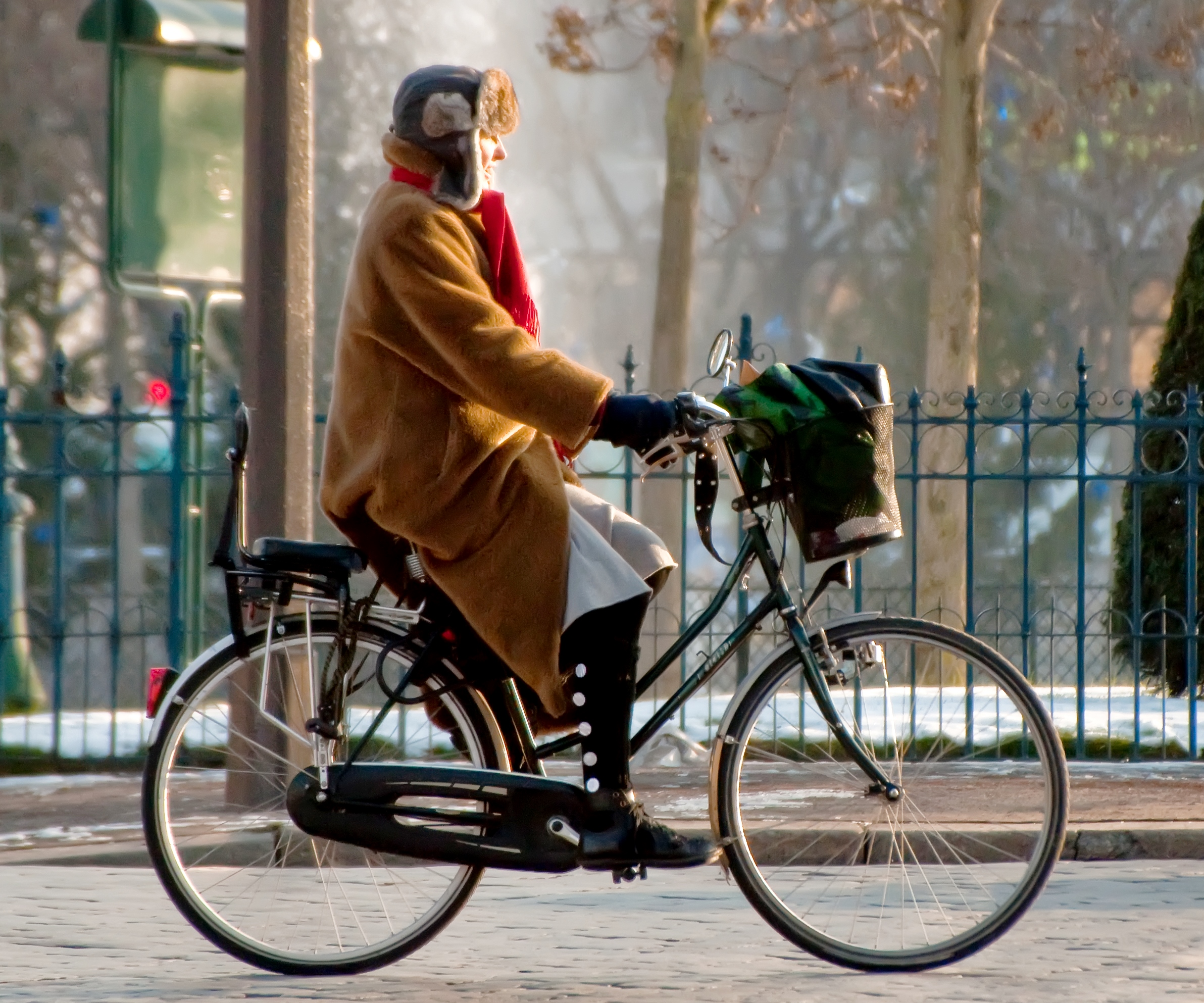 Cycliste sur le pavé de la place d'Italie à Paris, un jour de neige.